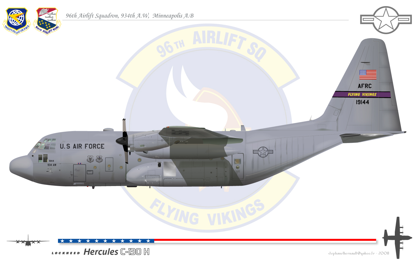 C 130H US Air Force 96th Airlift Squadron